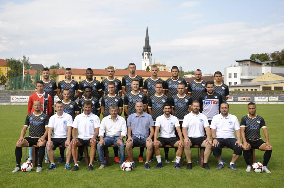 FK NOVES Spišská Nová Ves, II.liga SFZ 2017/2018